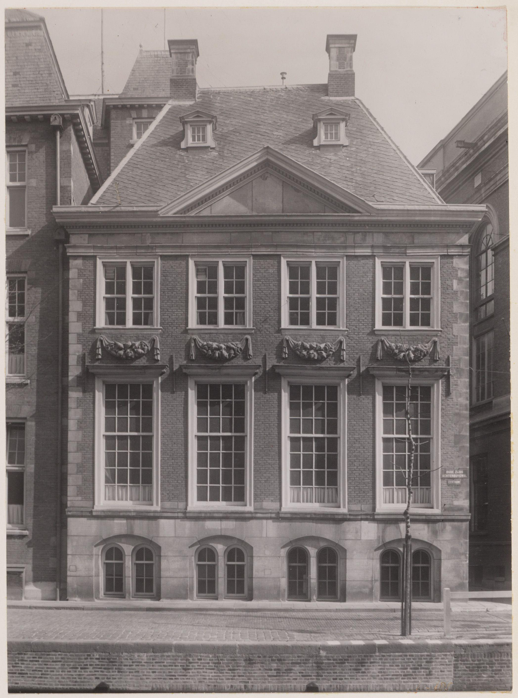 Beschrijving Het voormalige Spinhuis, Oudezijds Achterburgwal 185. Rechts de ingang van de Spinhuissteeg Gevel met guirlandes. Documenttype foto Vervaardiger Onbekend Anoniem Collectie Archief van het Bureau Monumentenzorg: glasnegatieven en negatiefloze foto's Datering mei 1943 Geografische naam Spinhuissteeg Oudezijds Achterburgwal Inventarissen Afbeeldingsbestand 012000004346